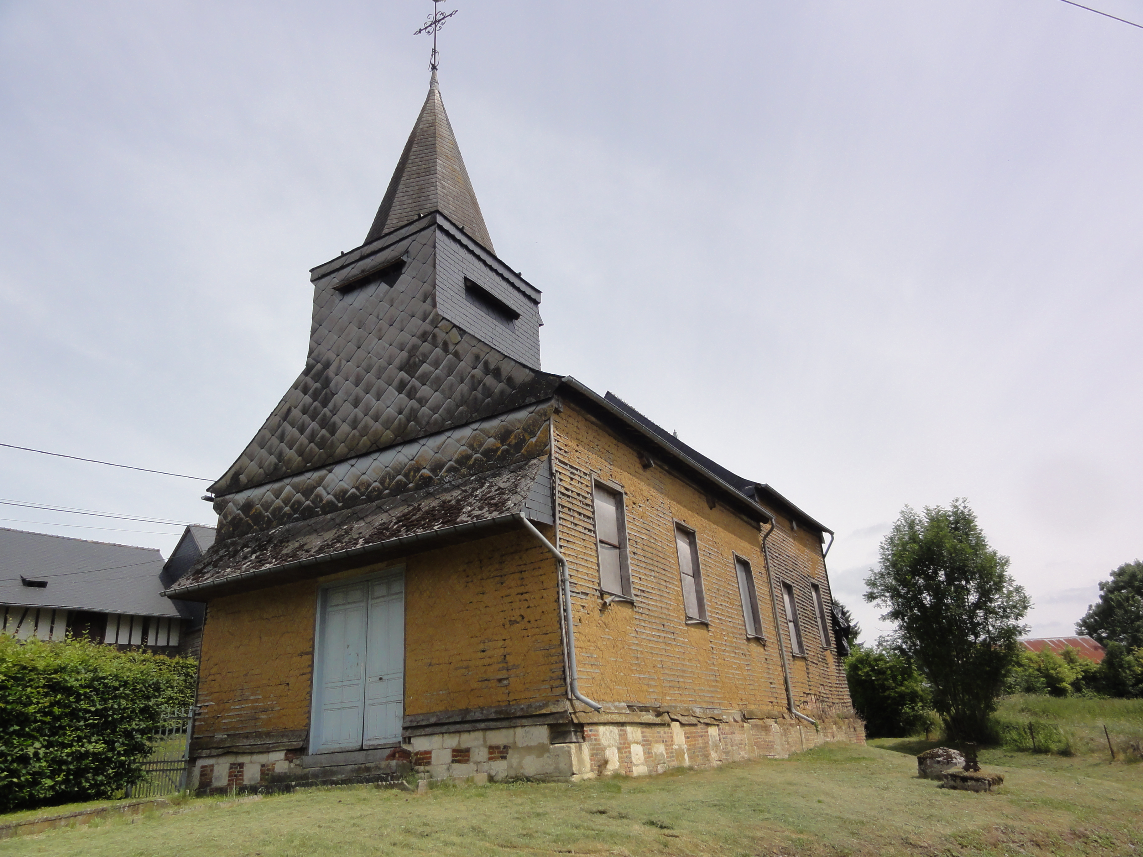 Église Saint-Nicolas de Rouvroy-sur-Serre